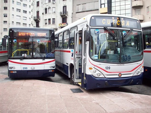 Buses de Montevideo Uruguay